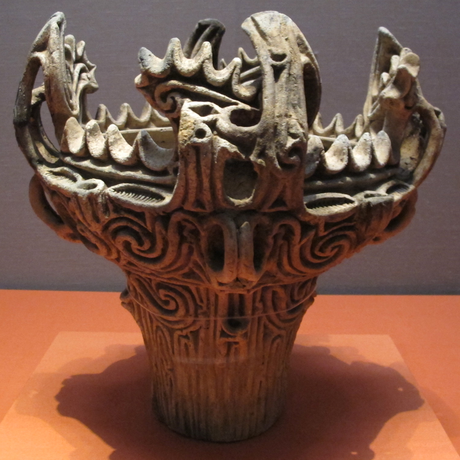 Periodo jomon, vaso con decorazione fiammeggiante, 3000-2000 a.c.